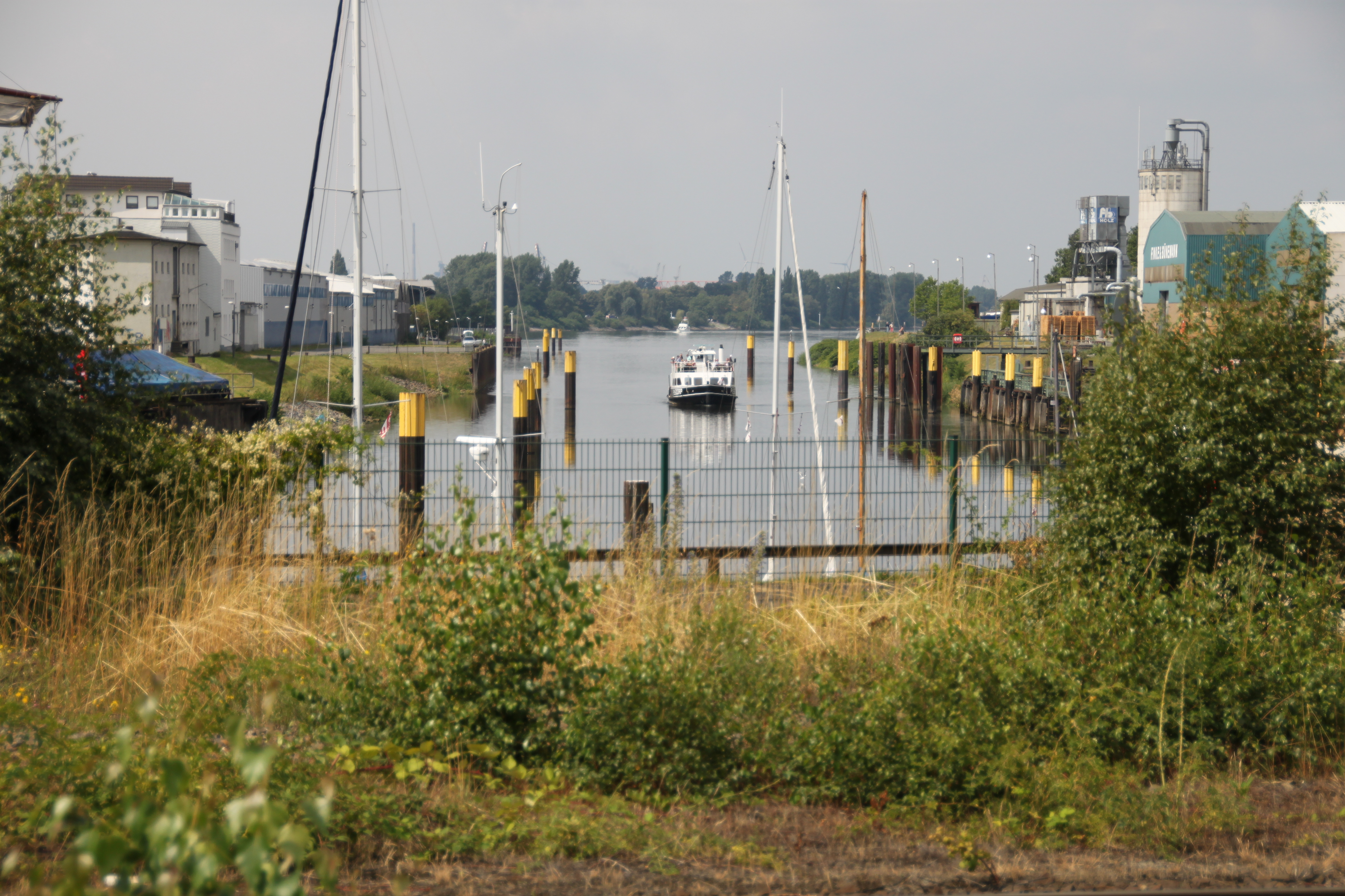 Hohentorshafen